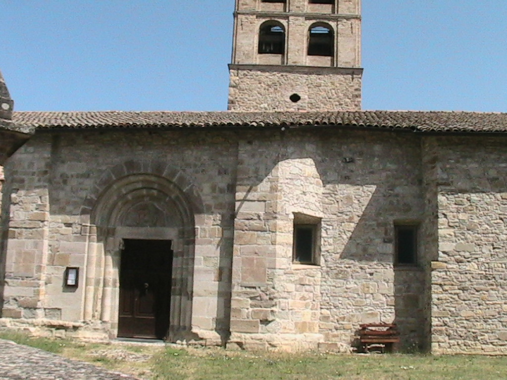 Bardone (Terenzo) - Pieve di Santa Maria Assunta